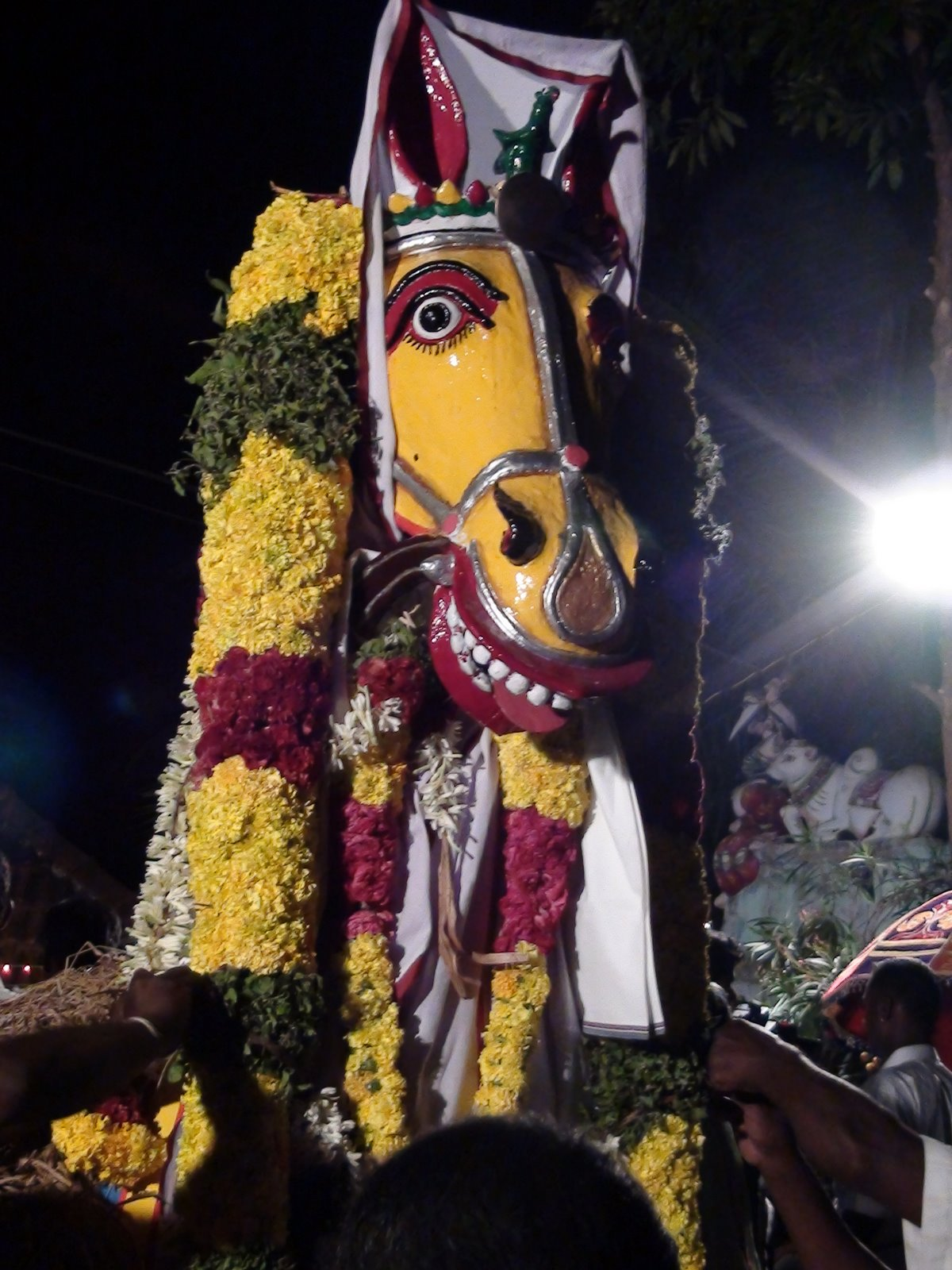 குதிரை உருவங்களை மண்ணால் செய்து அழகுபடுத்தி வழிபடும் கிராமியப் பாரம்பரிய விழாவில் அந்த அழகுக் குதிரையின் காட்சி